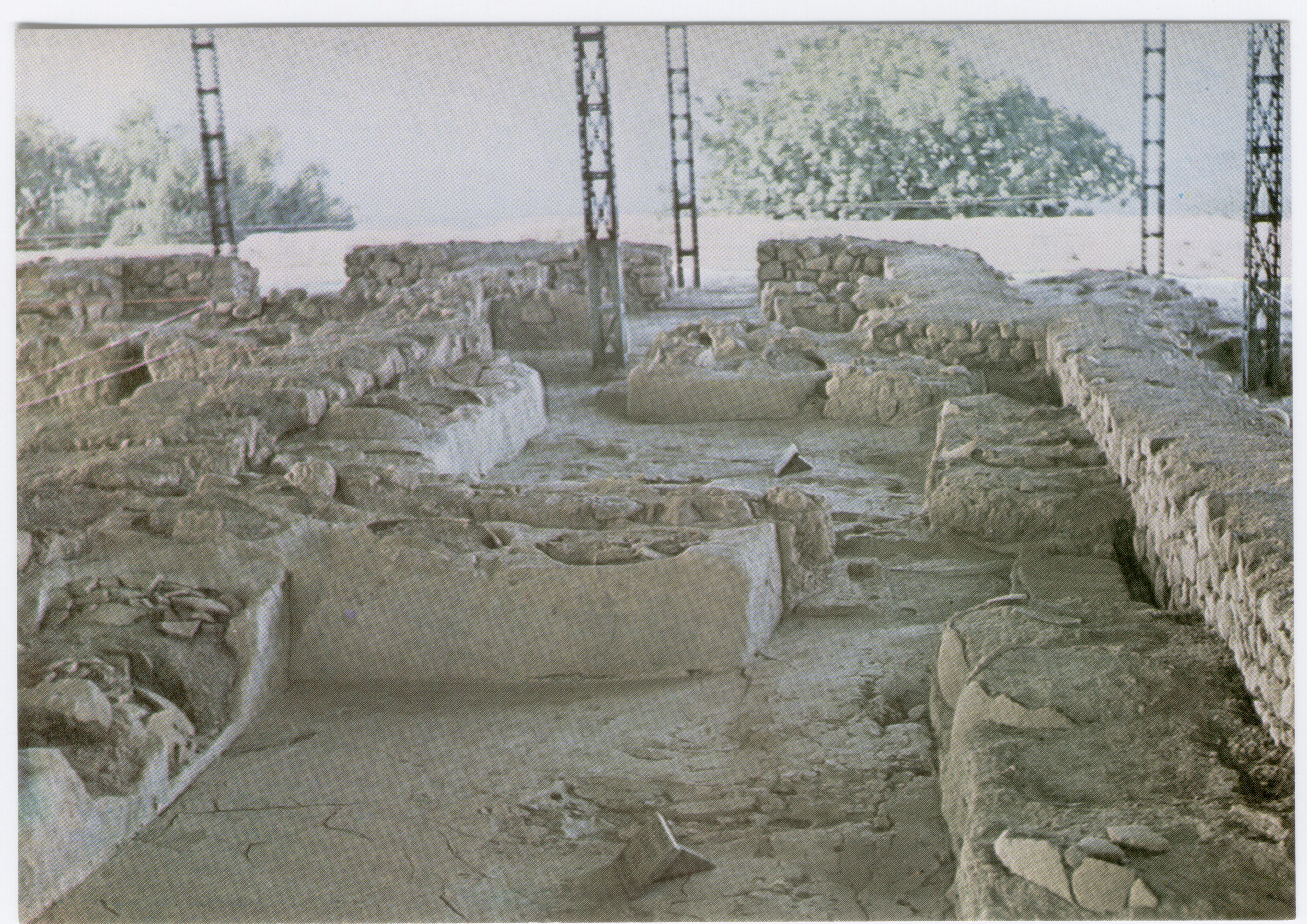 Pilo di Messenia - Palazzo di Nestore - Magazzini per l'olio